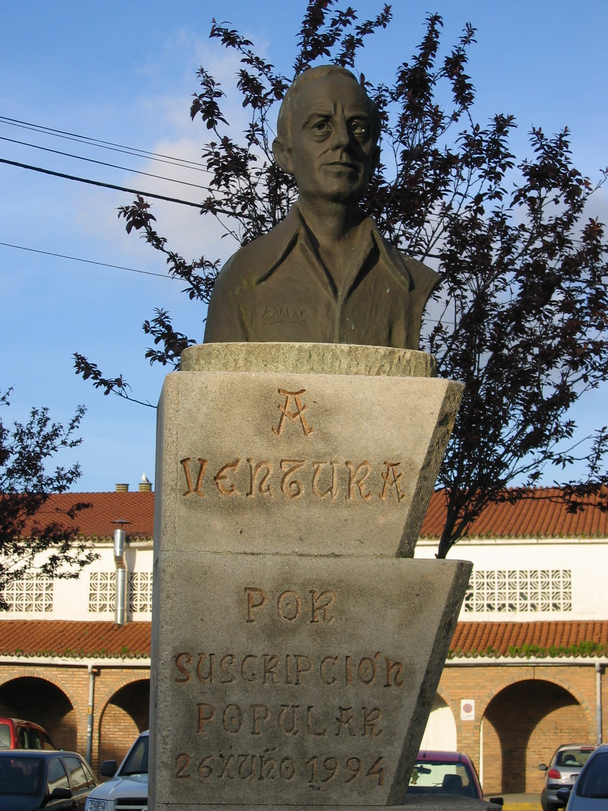 Busto en homenaxe a Buenaventura Fernández Fariña, fundador de "Érguete O Grove"